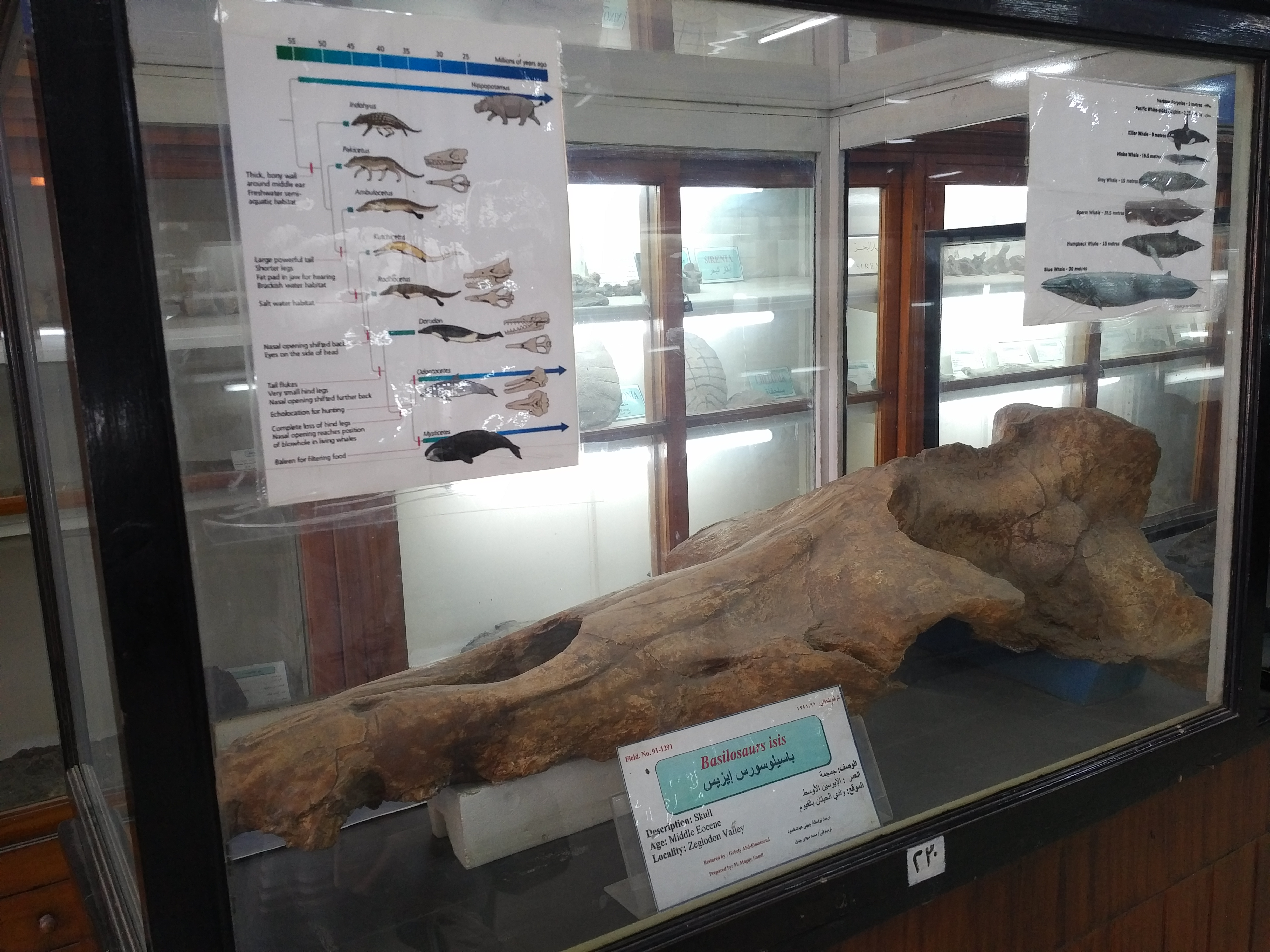 جمجة باسيلوسورس ايزيس من عصر الايوسين الأوسط في وادي الحيتان